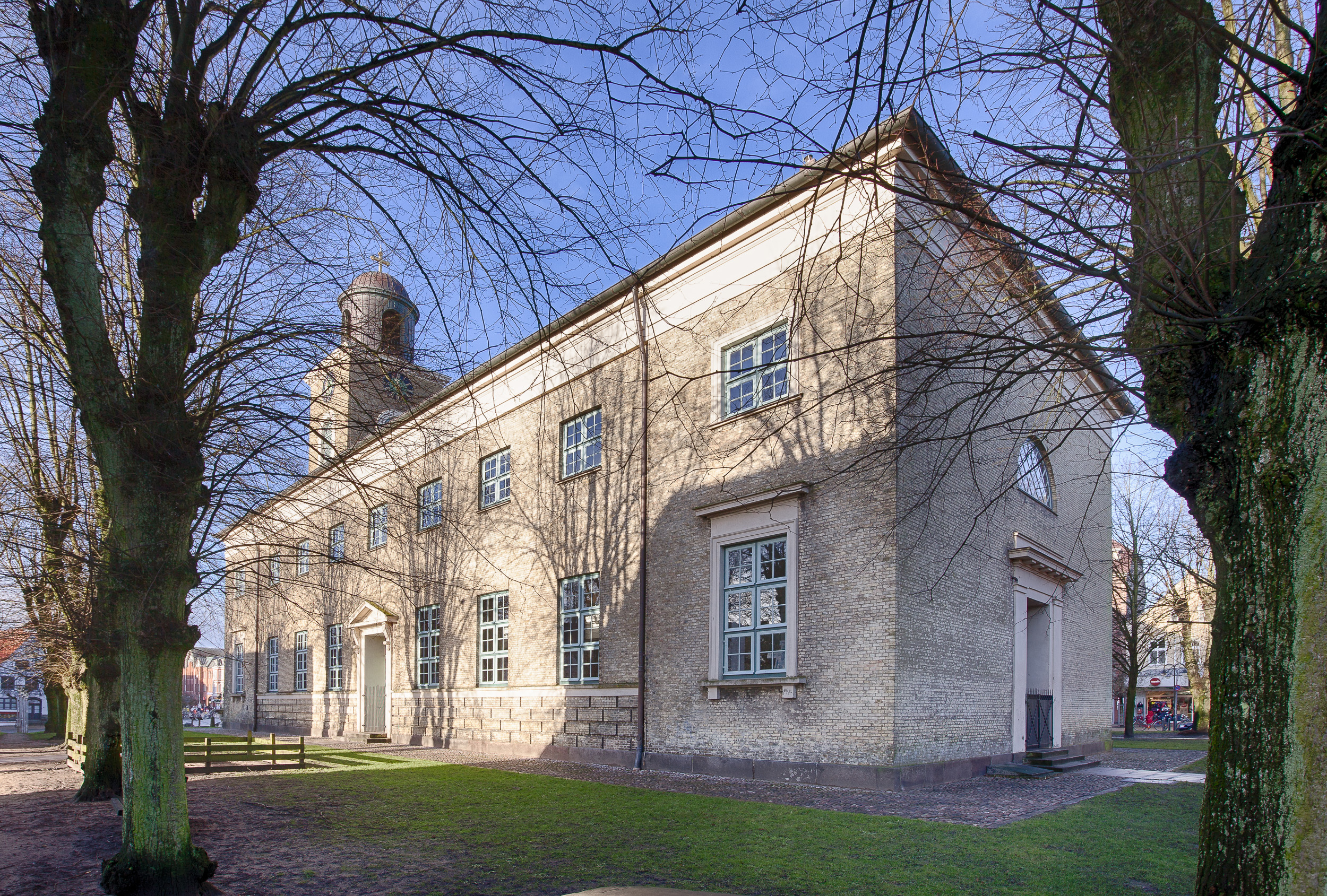 Marienkirche, Husum, Ansicht von Südost